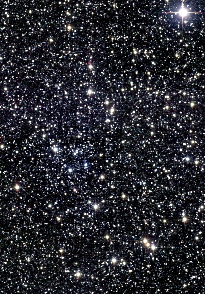 2MASS-Aufnahme von Messier 26